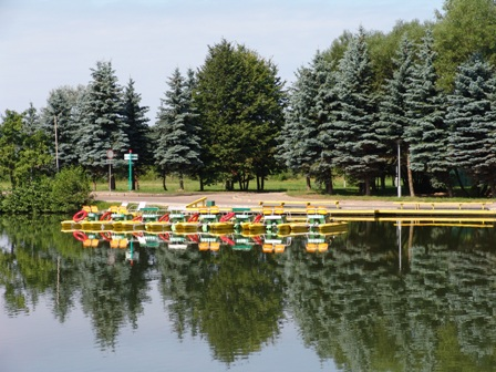 Centrinis Druskininkų ežeras.